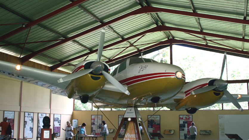 Jojo, l'avion de Jacques Brel dans l'espace Jacques Brel à Atuona